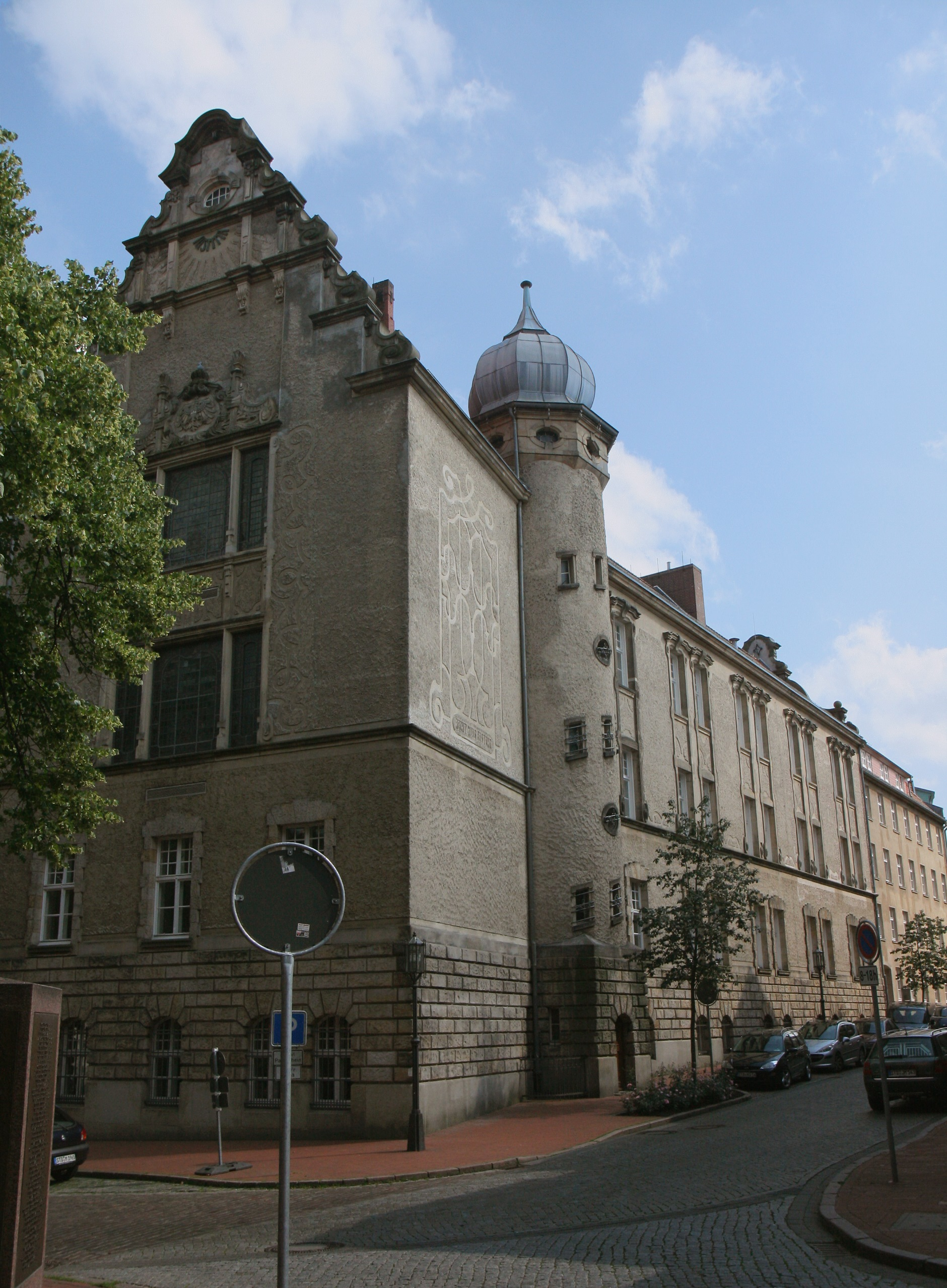 Gebäude des Landgerichts Stade und Amtsgerichts Stade, Wilhadikirchhof 1 in Stade. Blickrichtung Ritterstraße.